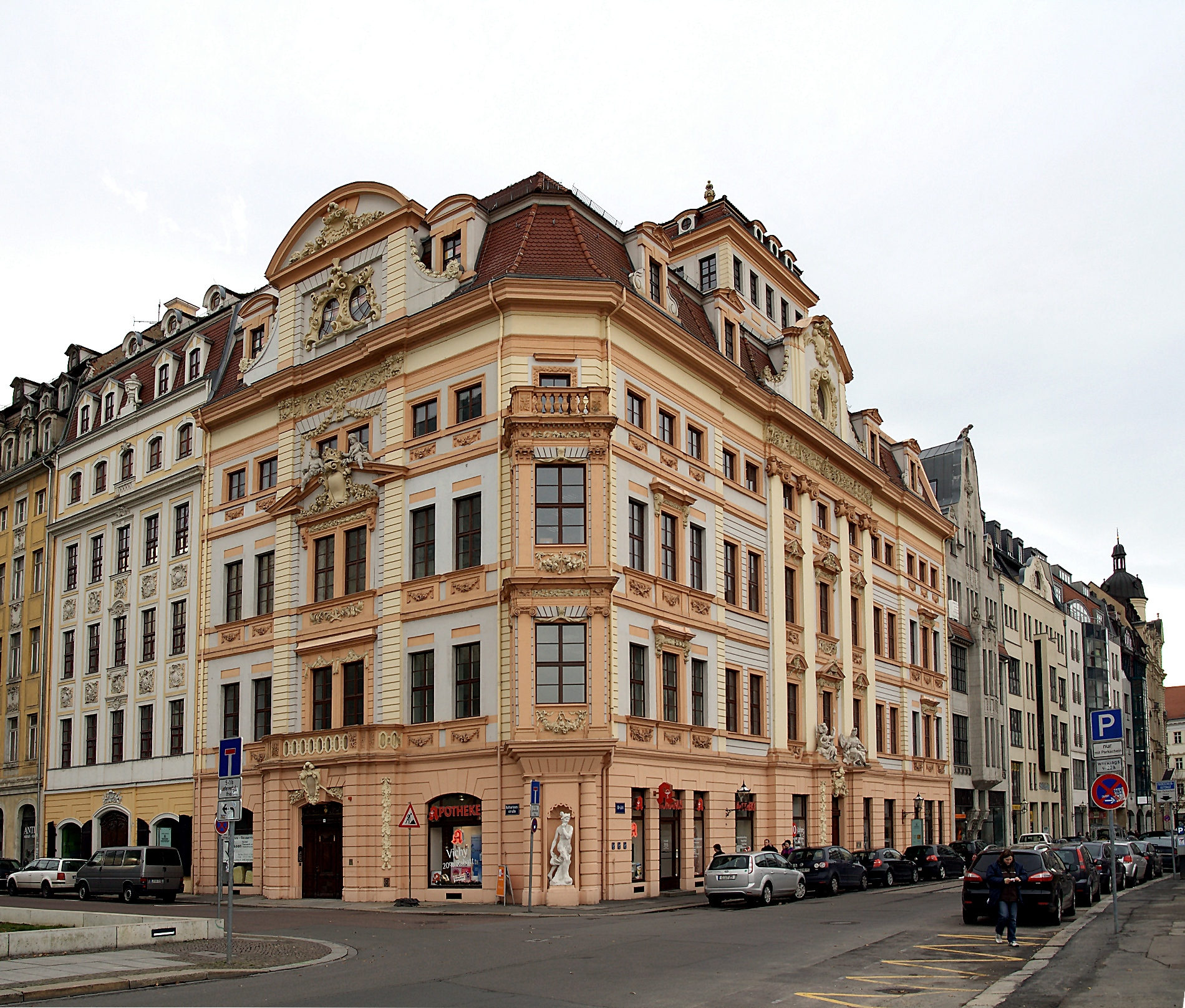 Romanushaus in Leipzig Camera data Camera Canon EOS 1000D Lens Sigma F2.8-4.5 17-70 mm DC MACRO Focal length 17 mm Aperture f/6.3 Exposure time 1/60 s Sensivity ISO 100